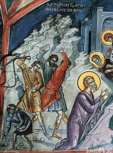 Anania_apostol.jpg: Картина "Мученицька смерть апостола Ананії"